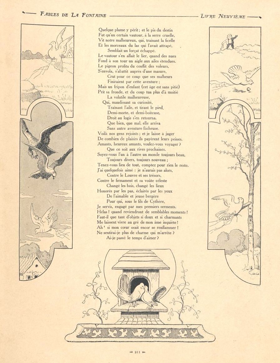 Fables de La Fontaine illustrées par Benjamin Rabier : Les deux pigeons.